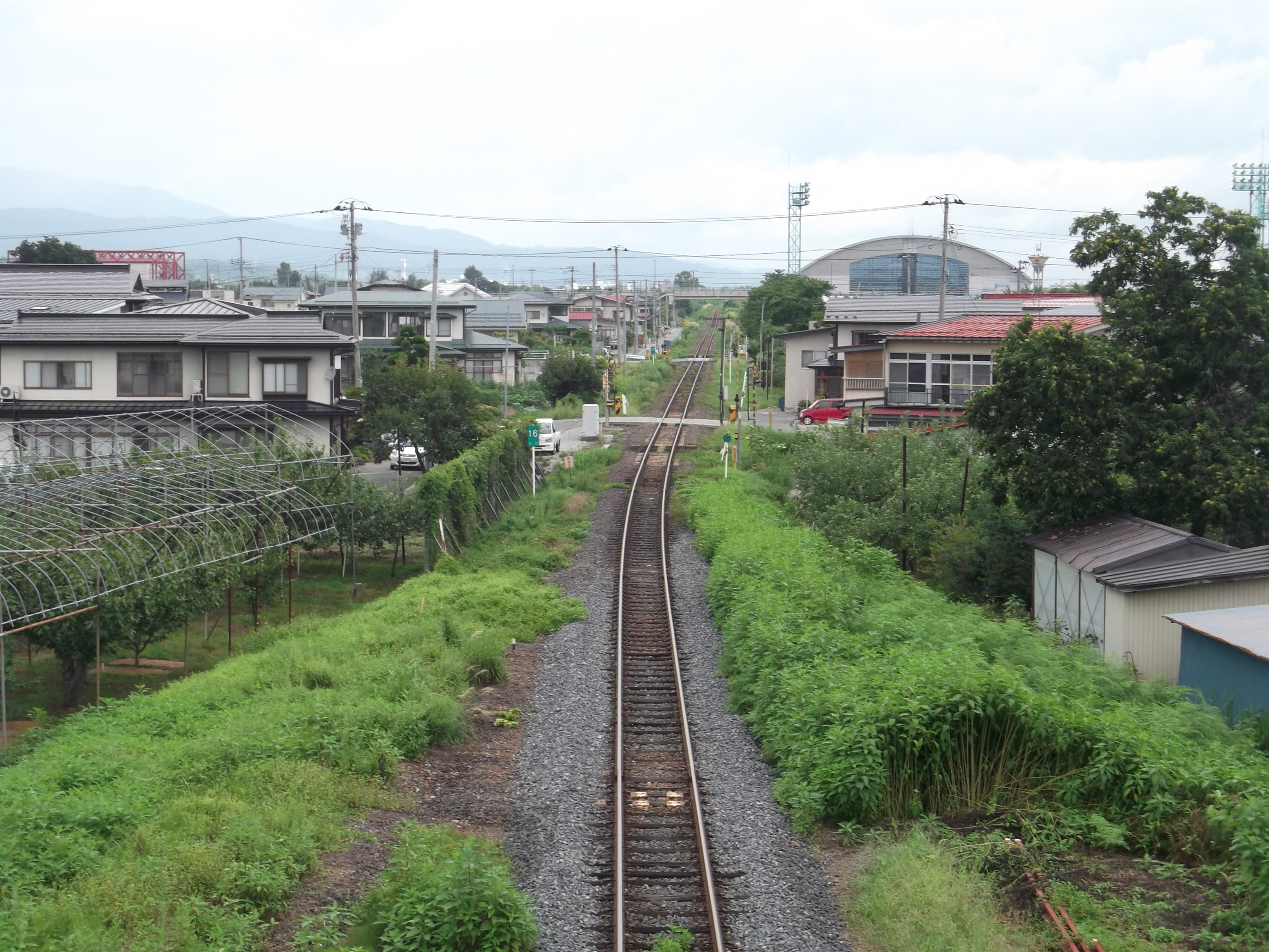 羽前長崎駅跨線橋から南寒河江駅方面を望む